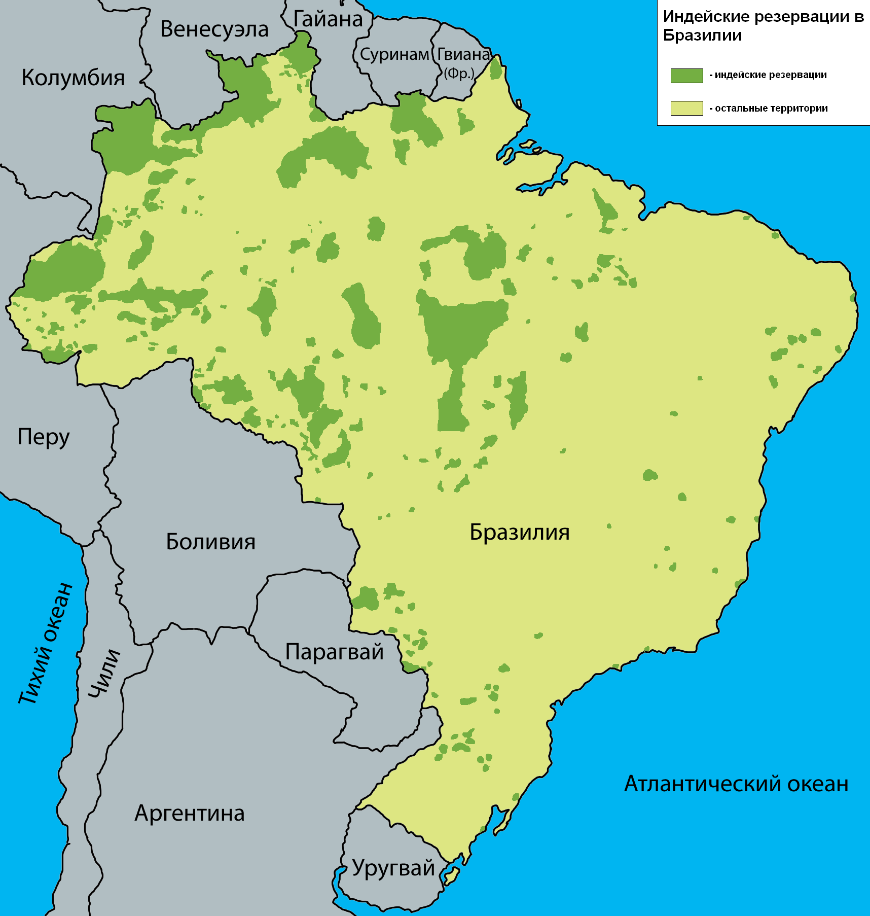 Карта индейских резерваций в Бразилии